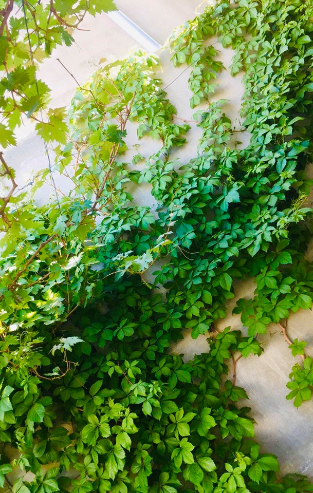 صورة لأحد النباتات المعلقة في منطقة ماركا الشمالية في العاصمة عمان